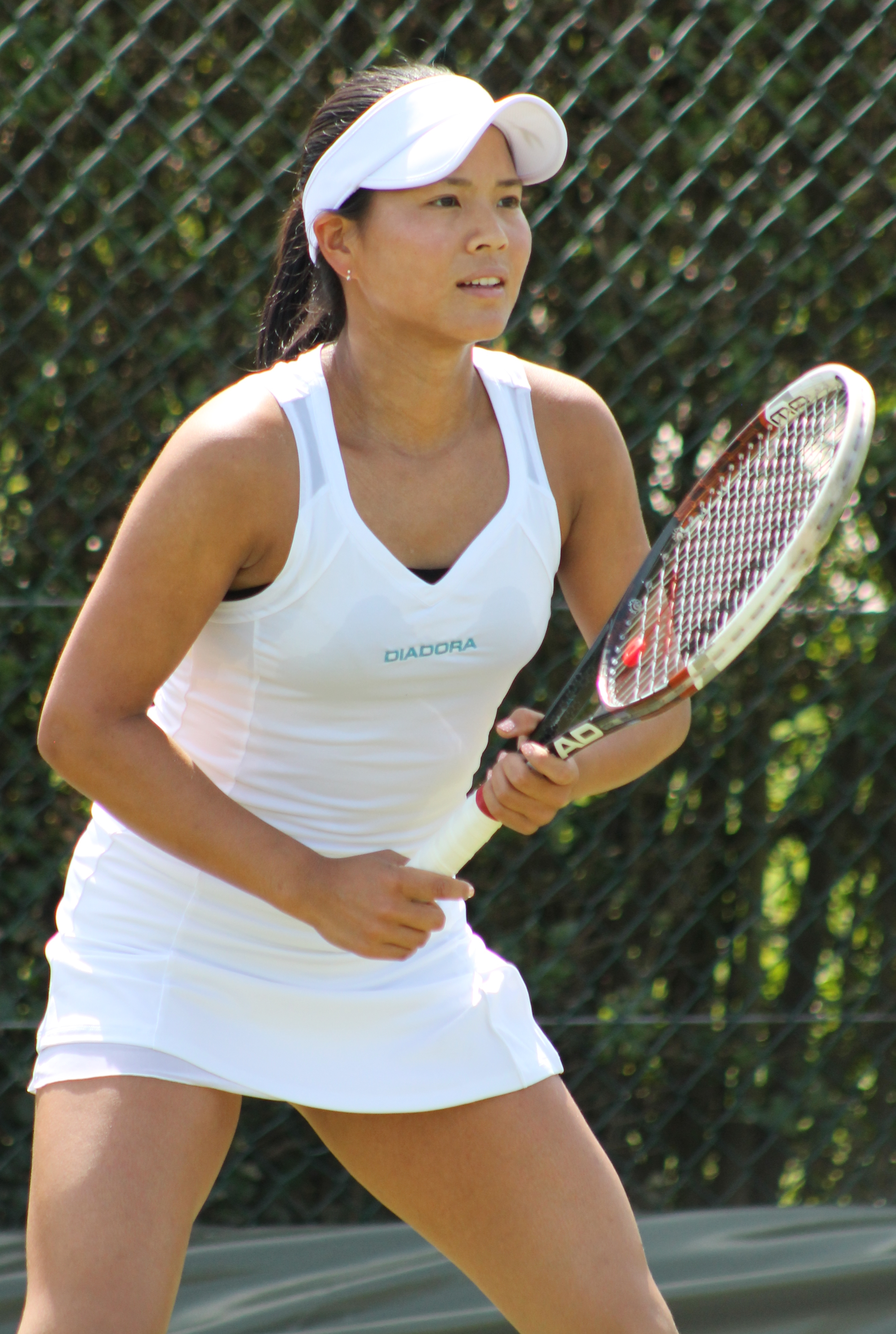 Ozaki WMQ14 (2)